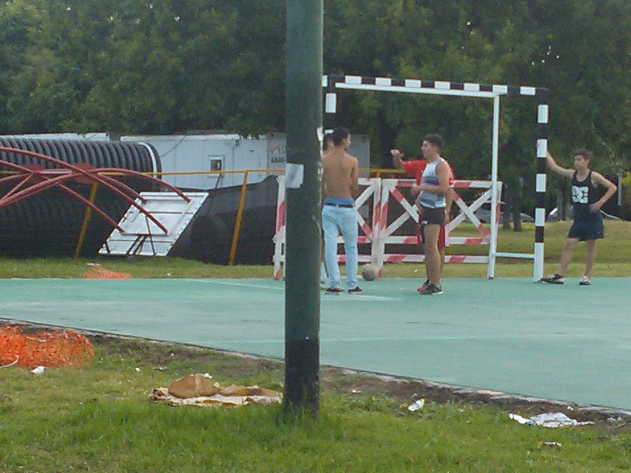 Los aros ya no están, las "jirafas" estan tiradas en el suelo 2